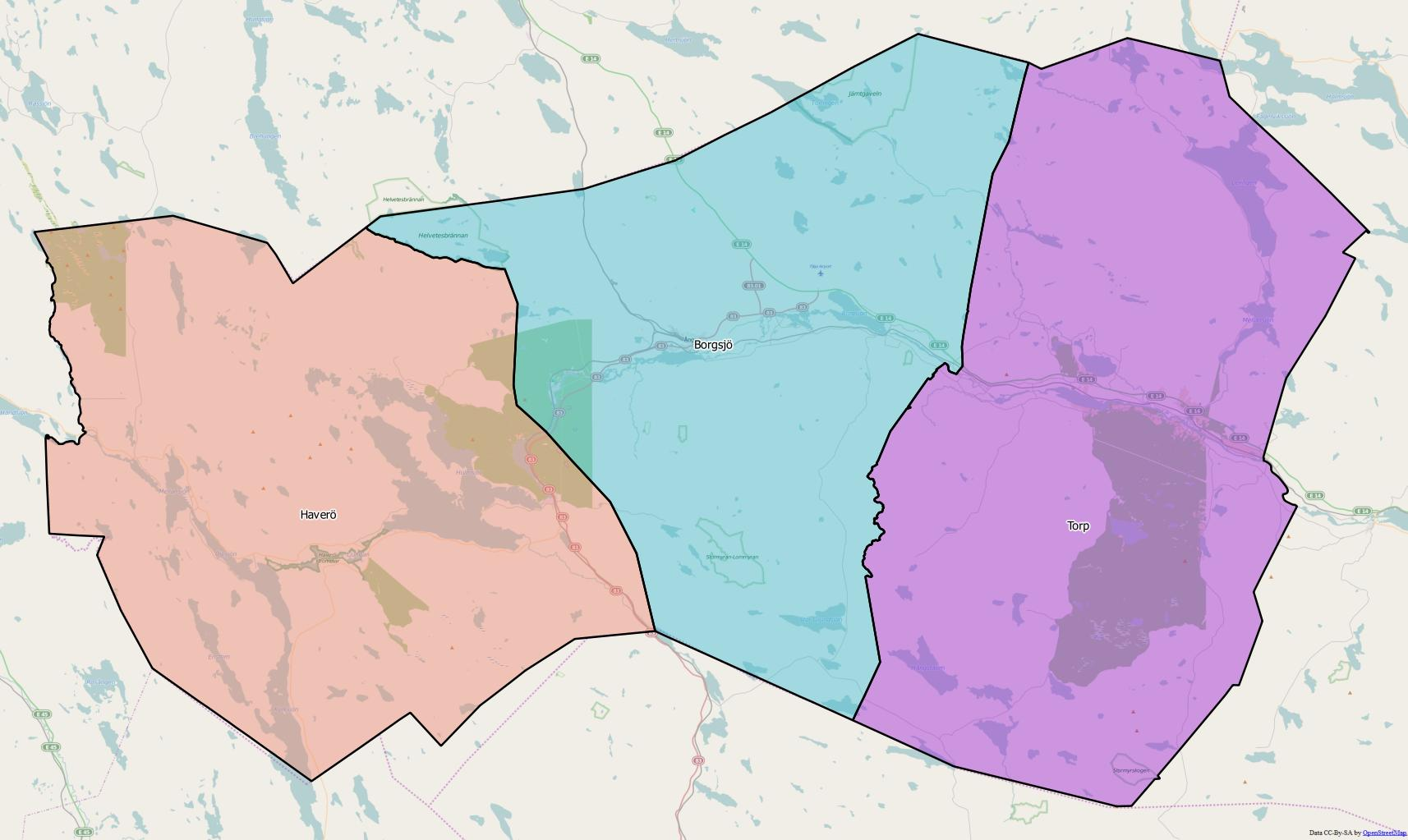 Distriktsindelningen i Ånge kommun World file 122.51609801383044385 0 0 -122.51609801383044385 1640382.15205365745350718 9035161.71201300621032715